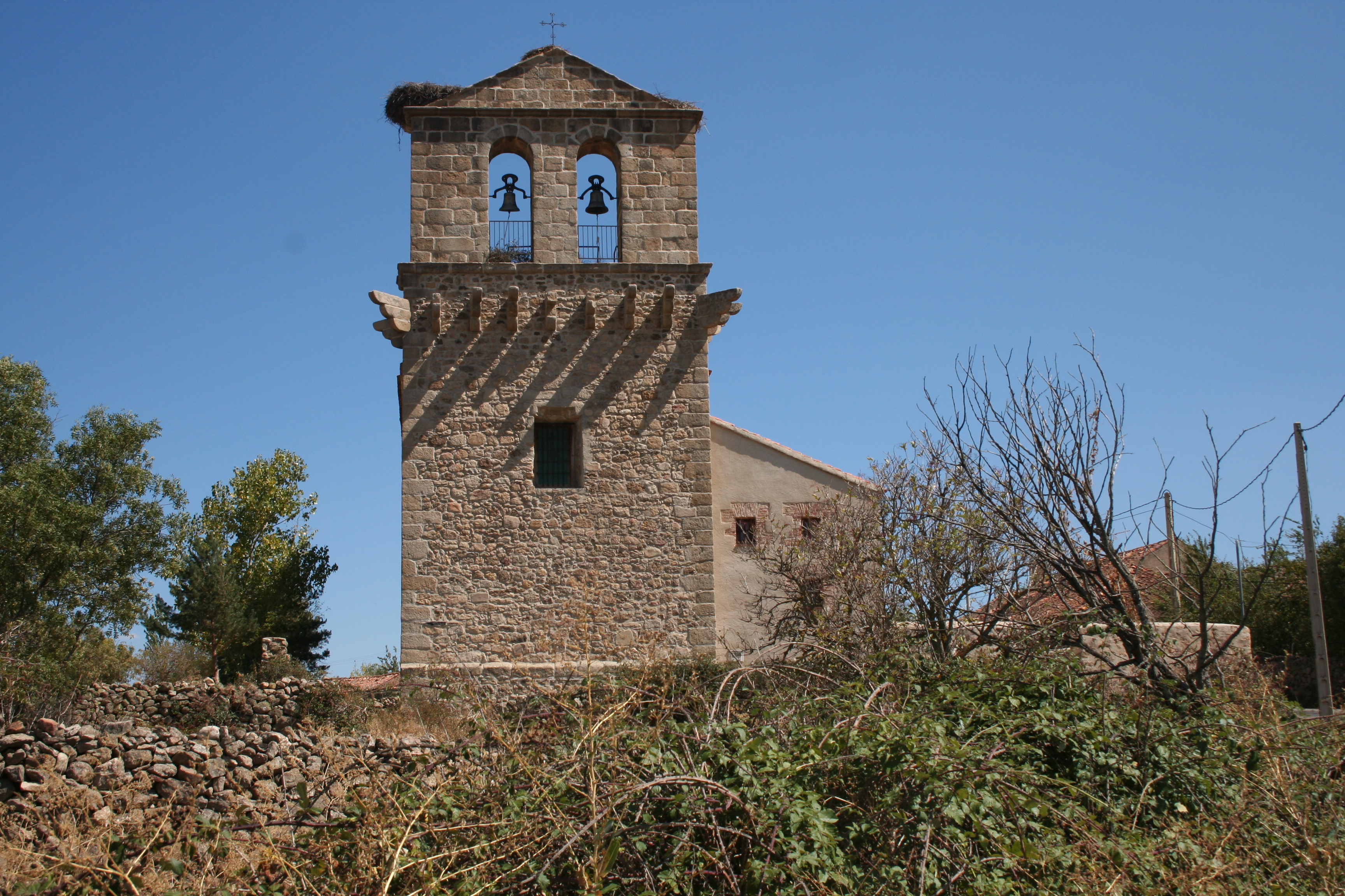 Iglesia de Santo Domingo (Santo Domingo de Pirón, Segovia, España).